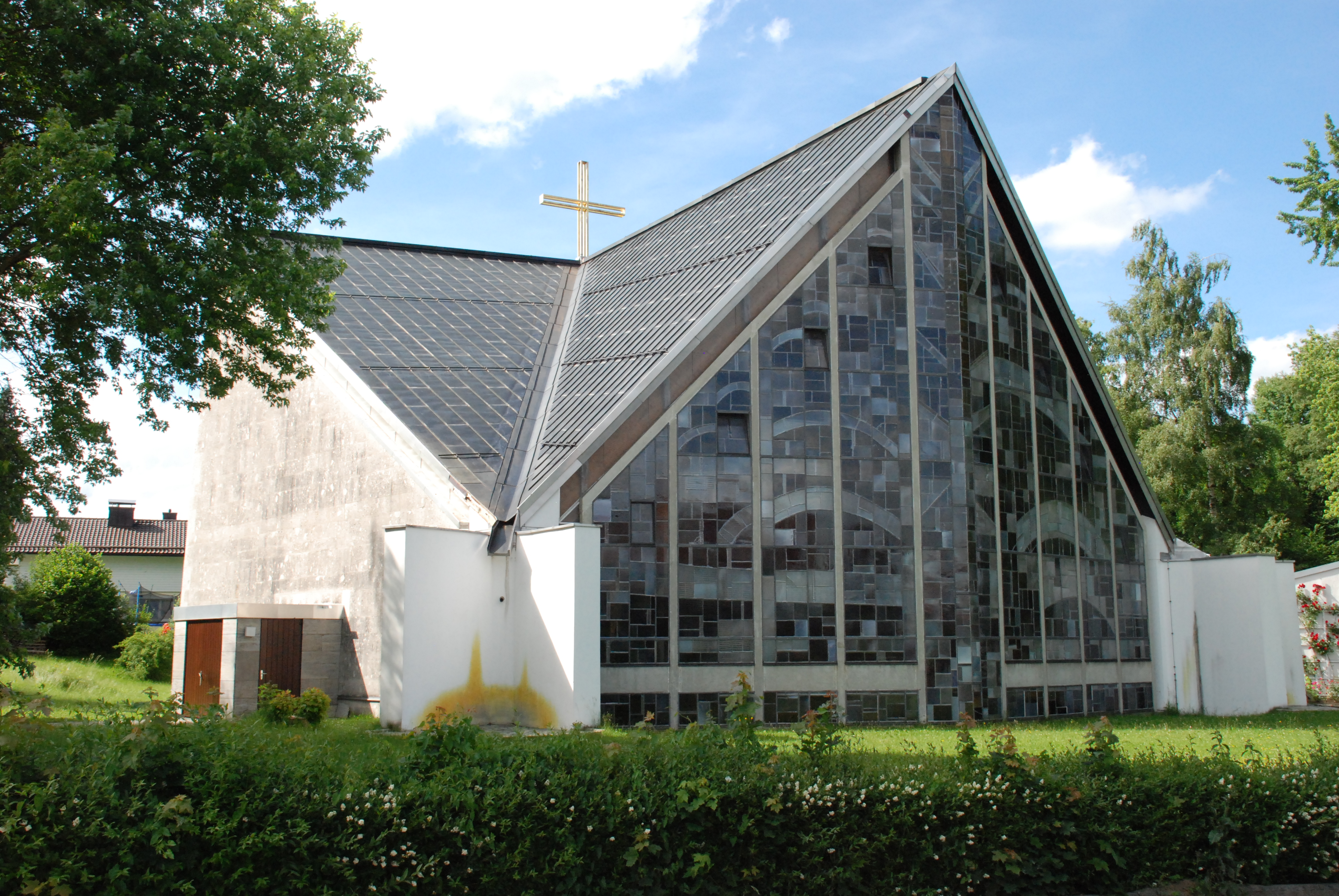 St. Josef (Holzkirchen). Erbaut im Jahr 1962, Architekt Franz Ruf. Die Kirche wurde wegen statischer Mängel der Dachkonstruktion 2011 geschlossen und 2012 profaniert. Nach dem Abriss wird voraussichtlich bis 2015 an gleicher Stelle eine neue Kirche erbaut.